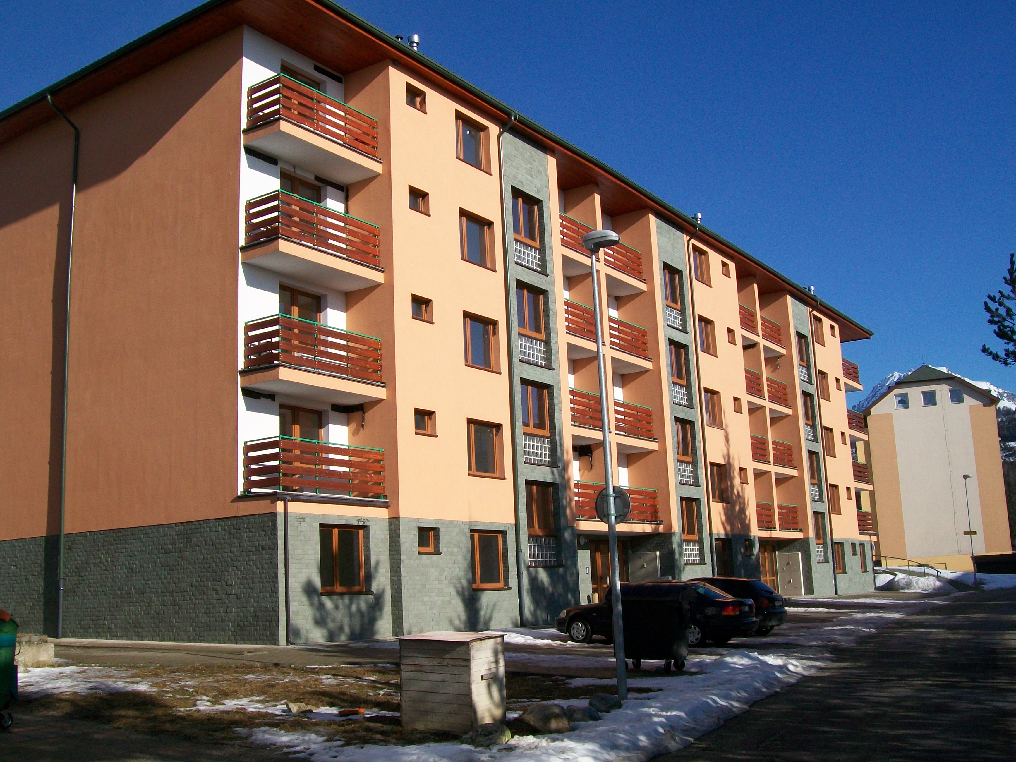 Apartmány Pálenica v Tatranskej Štrbe